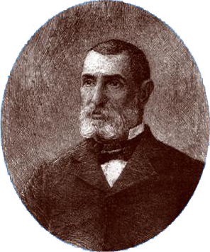 Ritratto di Giuseppe Pavoncelli Si ringrazia per la disponibilità la Famiglia Pavoncelli nella persona del signor Franco Pavoncelli. (OTRS Ticket#2007122110006062)